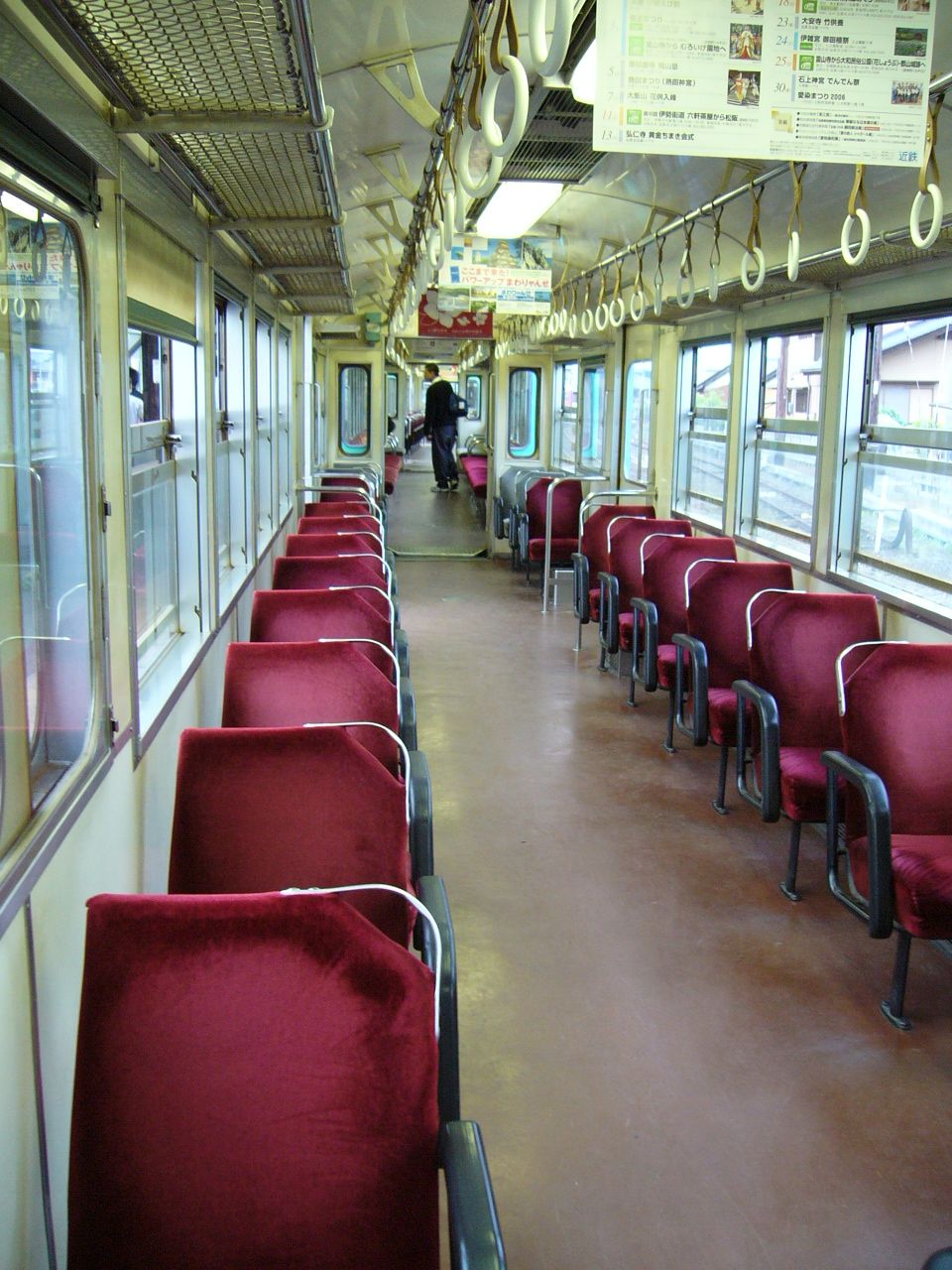 近鉄ナロー車輌の車内 260形261号から、編成内を見通す 内部駅にて